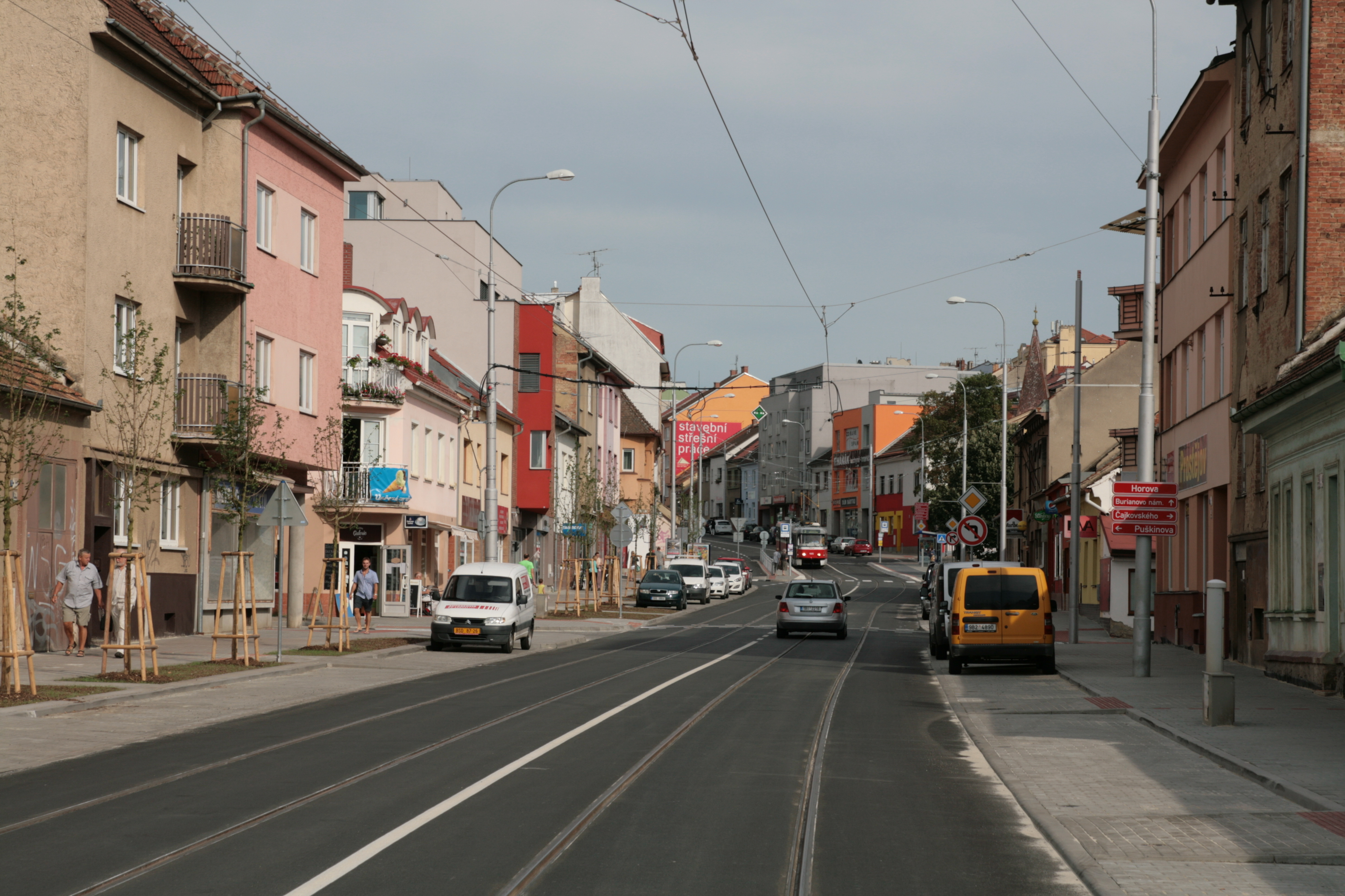 Ulice Horova v Brně-Žabovřeskách. První den ostrého provozu po rekonstrukci.